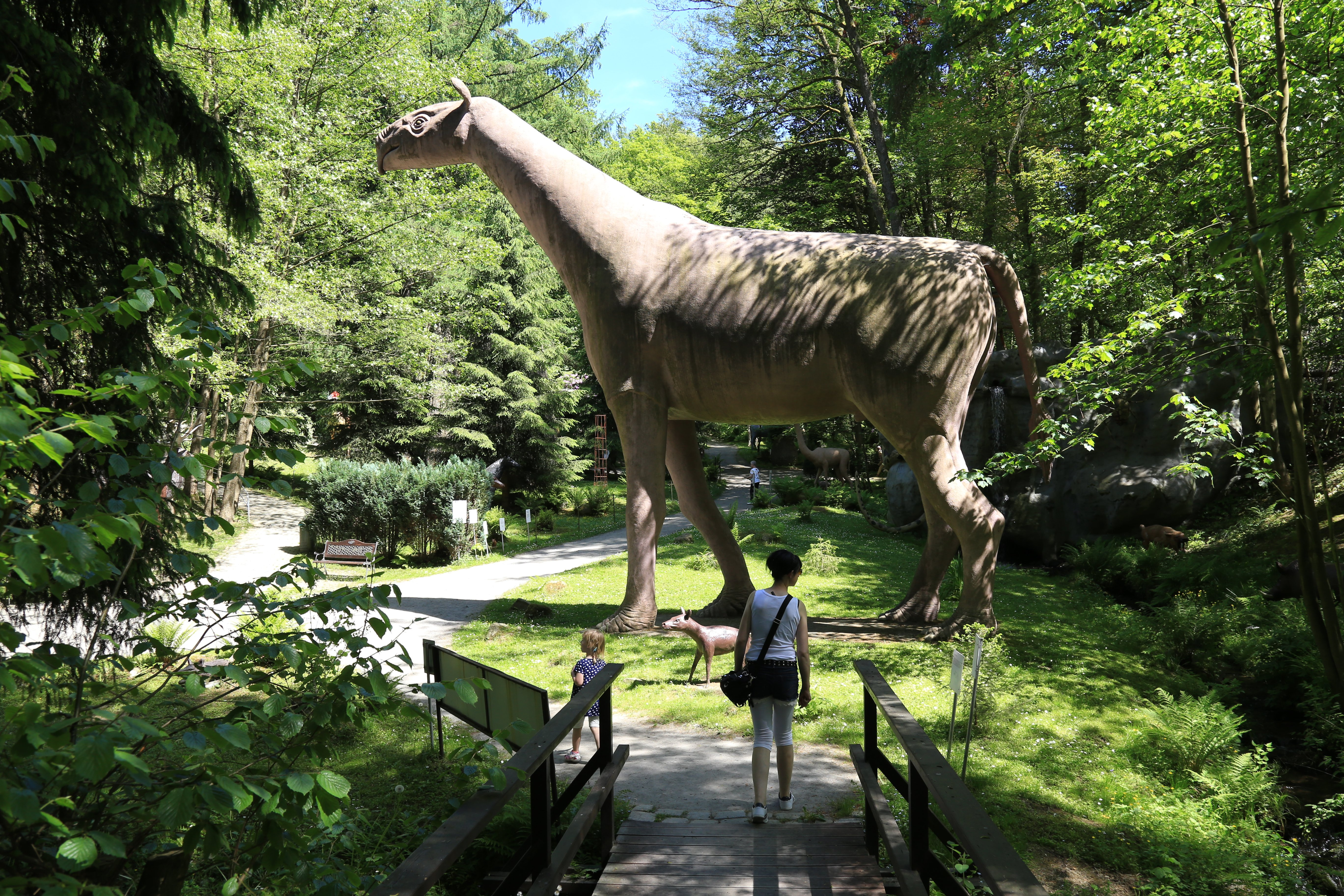 Urzeitpark Sebnitz Mai 2017 (23)